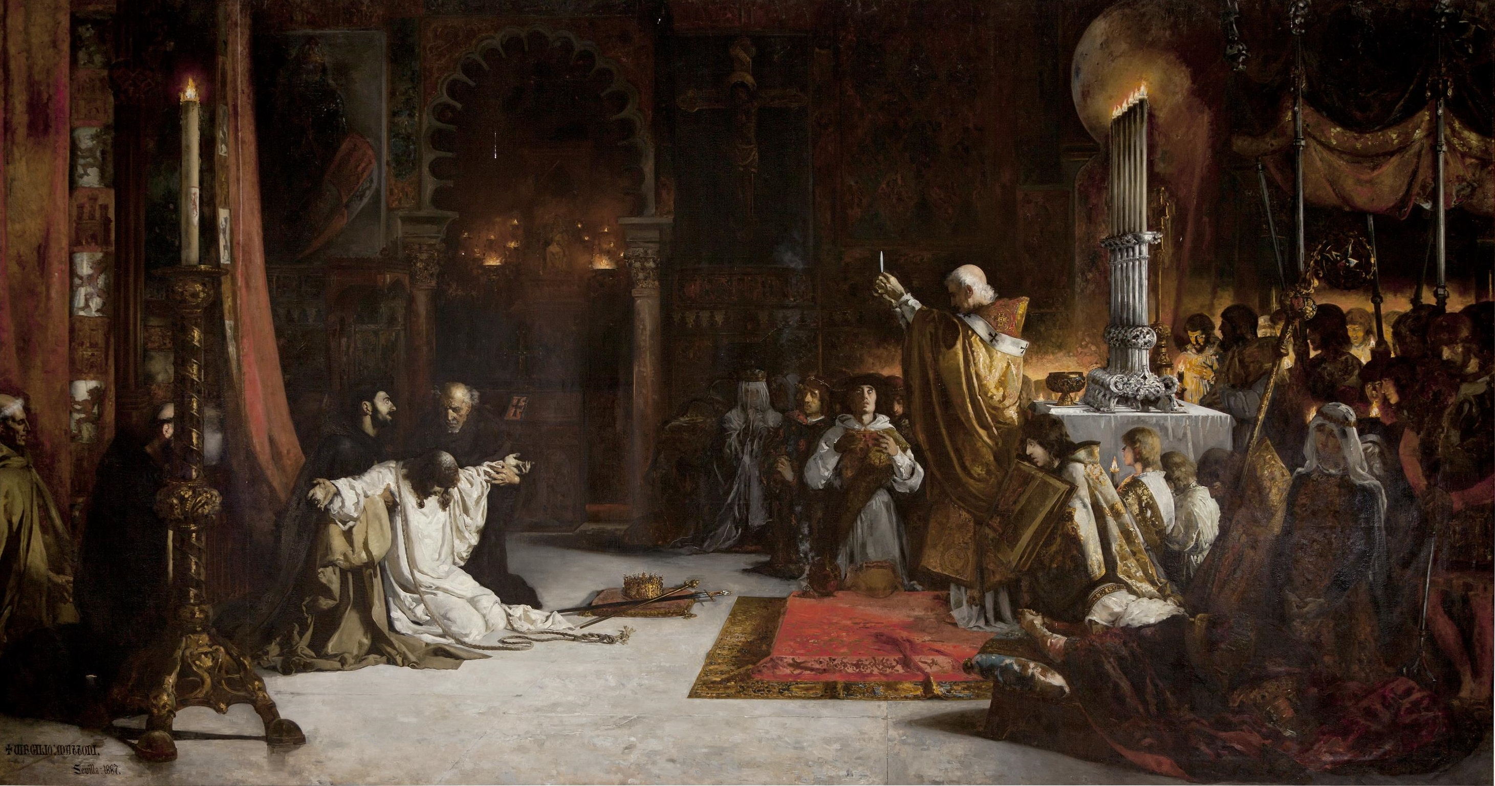 La obra representa los últimos momentos del rey Fernando III de Castilla († 1252), apodado el Santo, que falleció en la ciudad de Sevilla el día 30 de mayo de 1252, y es considerada la obra cumbre del pintor sevillano Virgilio Mattoni. Este lienzo fue pintado para la Exposición Nacional de 1887, donde fue premiado con la segunda medalla, y el modo en que quedó representada la muerte del monarca está inspirado en un fragmento de la Crónica de España, que fue compuesta durante el reinado de su propio hijo y heredero, Alfonso X el Sabio.